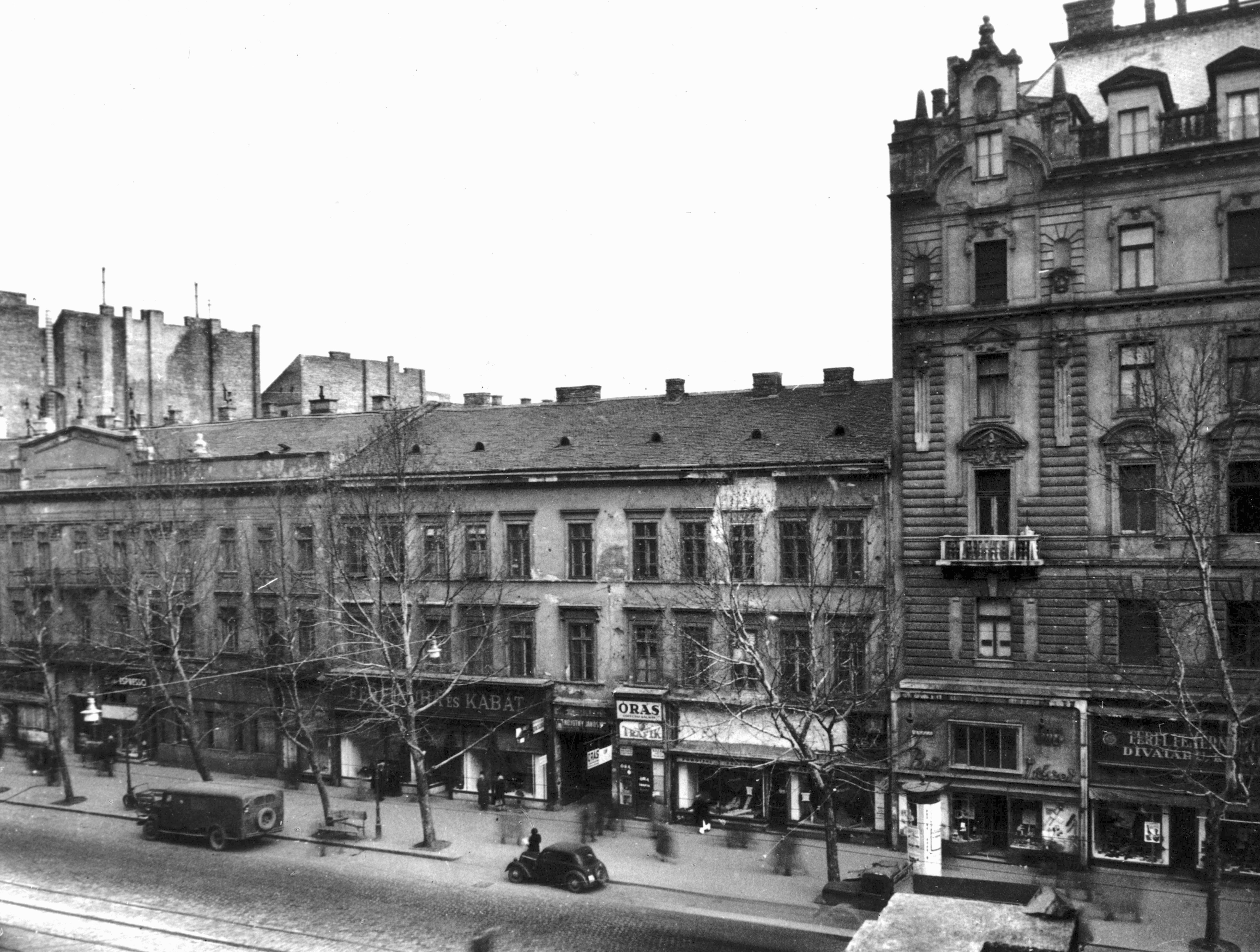 A kép forrását kérjük így adja meg: Fortepan / Budapest Főváros Levéltára. Levéltári jelzet: HU_BFL_XV_19_c_11 Location: Hungary Tags: Budapest Title: A kép forrását kérjük így adja meg: Fortepan / Budapest Főváros Levéltára. Levéltári jelzet: HU_BFL_XV_19_c_11